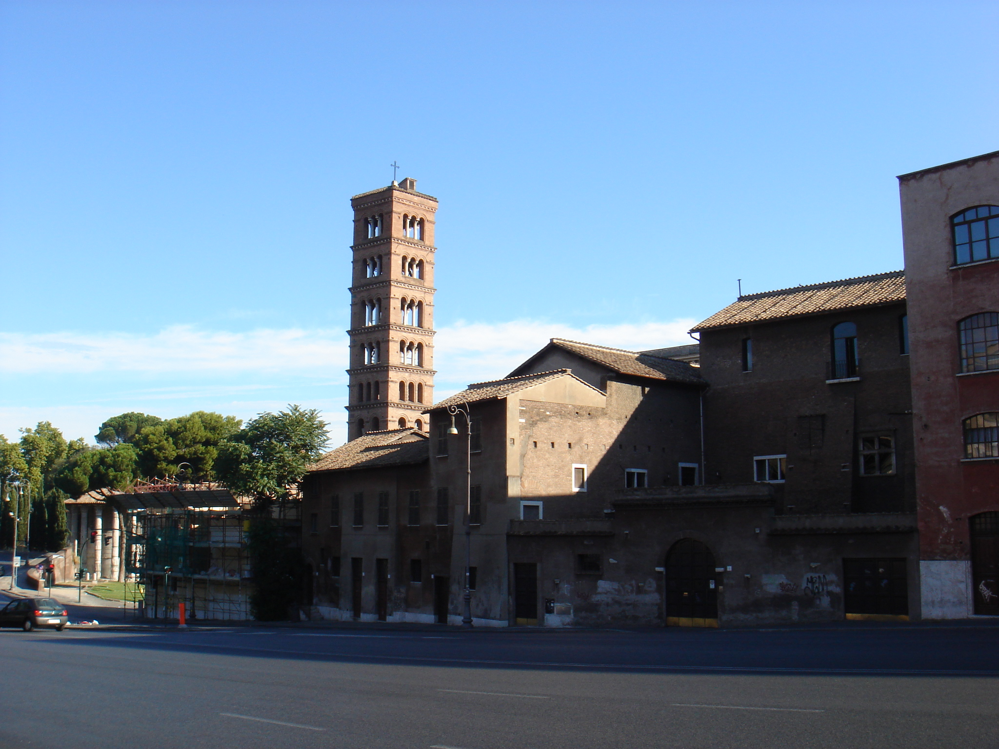 Roma, complesso di S. Maria in Cosmedin da via della Greca.